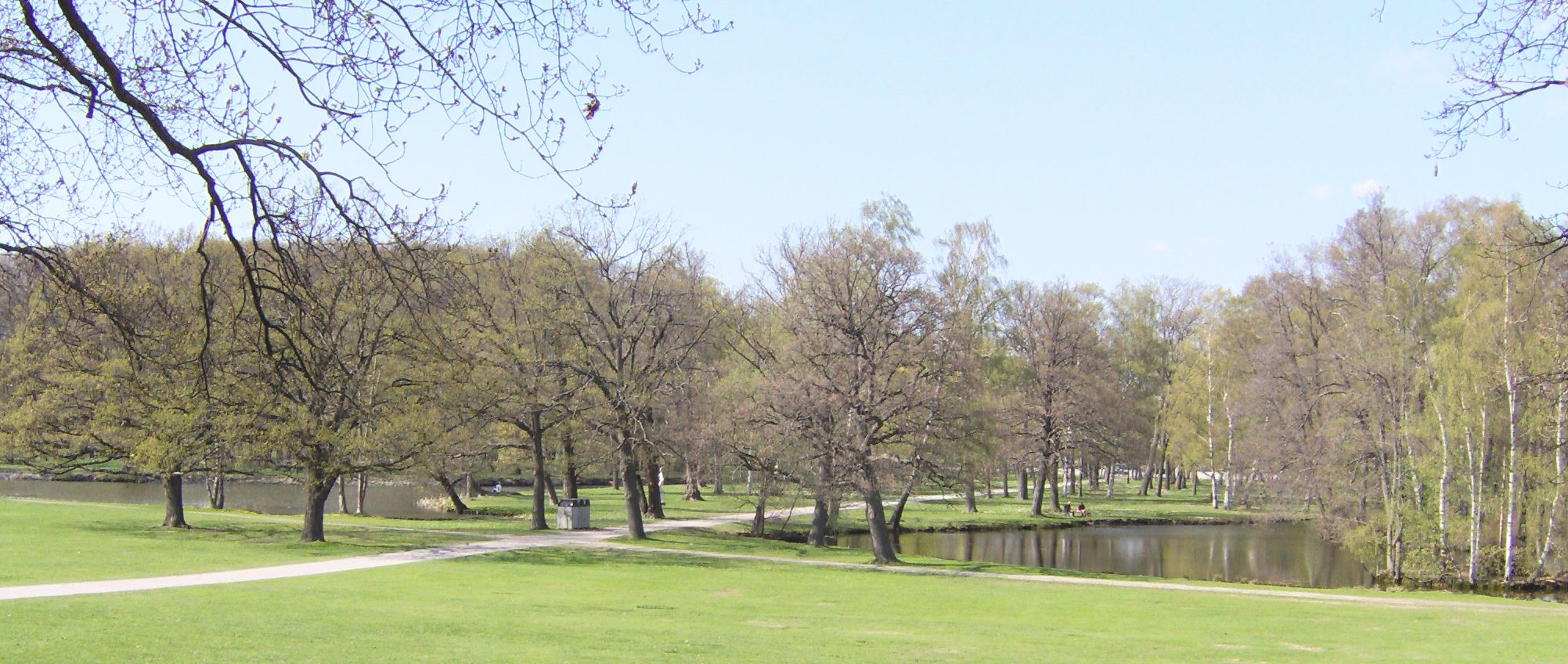 Engelska parkendelen i Drottningholms park, Stockholm, Sverige. English park in Drottninghols castlepark, Stockholm, Sweden. 2006.